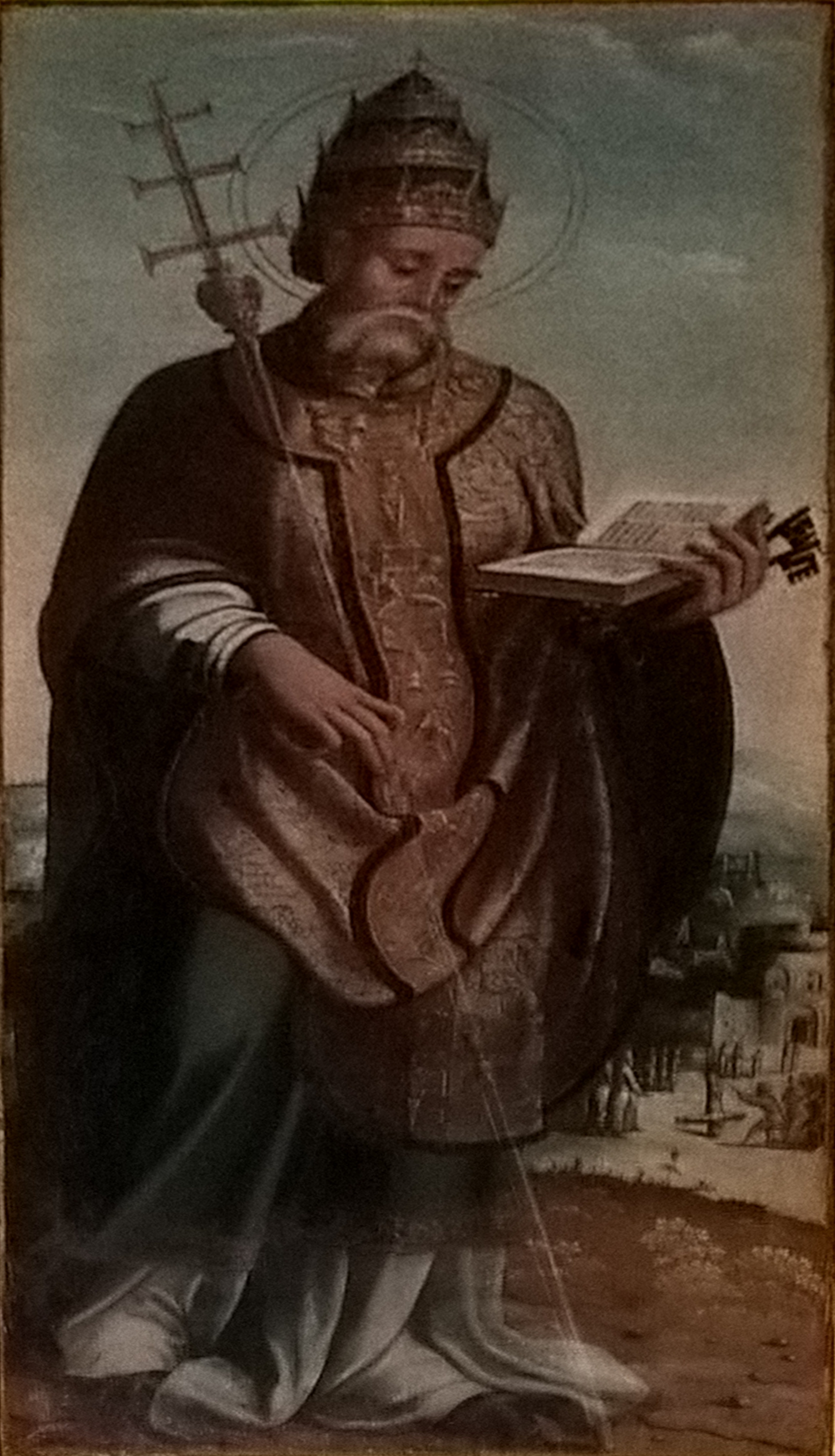 Pintura "S. Pedro" do Mestre de Arruda dos Vinhos, integrante do Políptico quinhentista da Matriz de Arruda dos Vinhos, de cerca de 1550